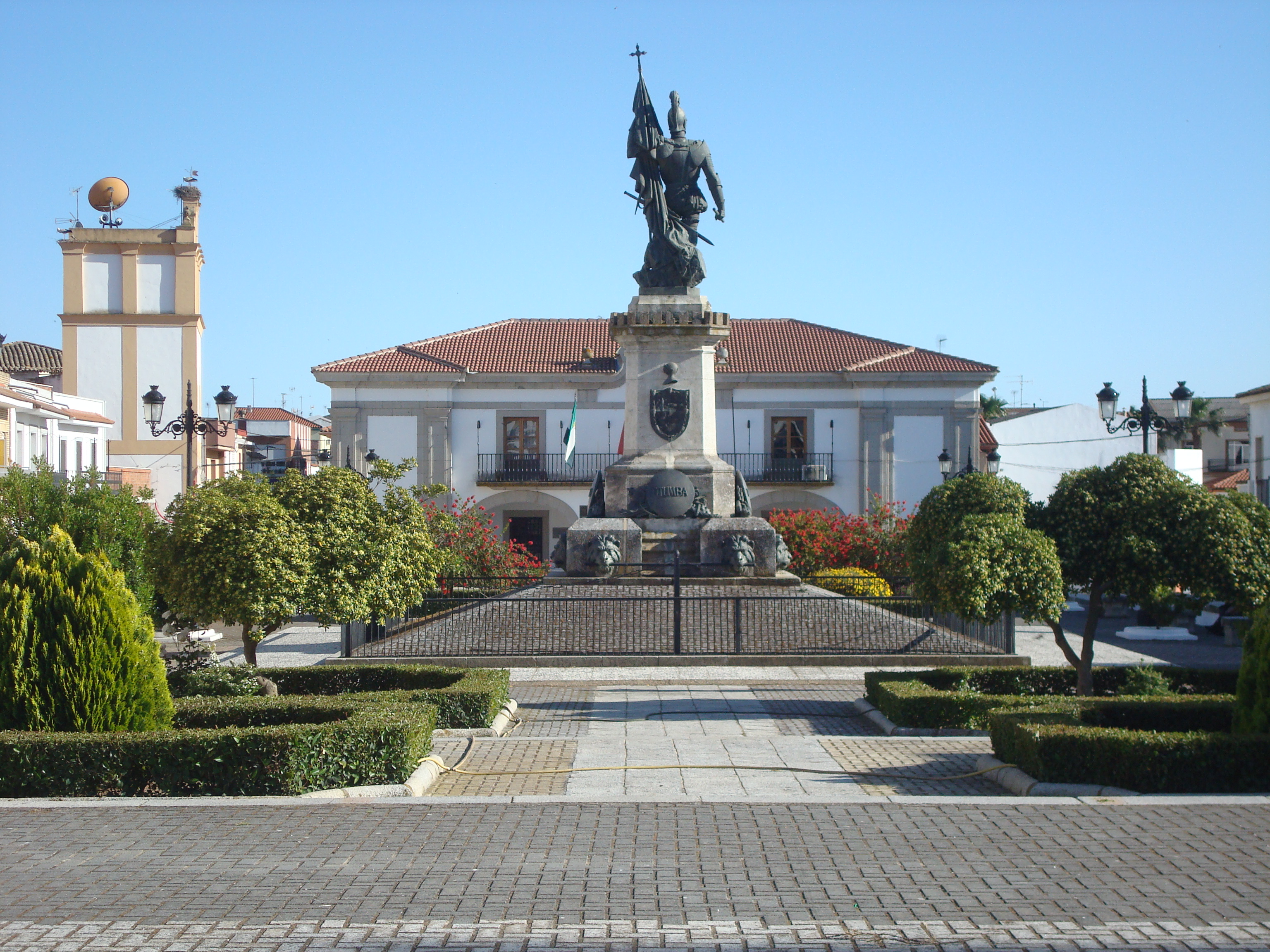 Medellin - 001